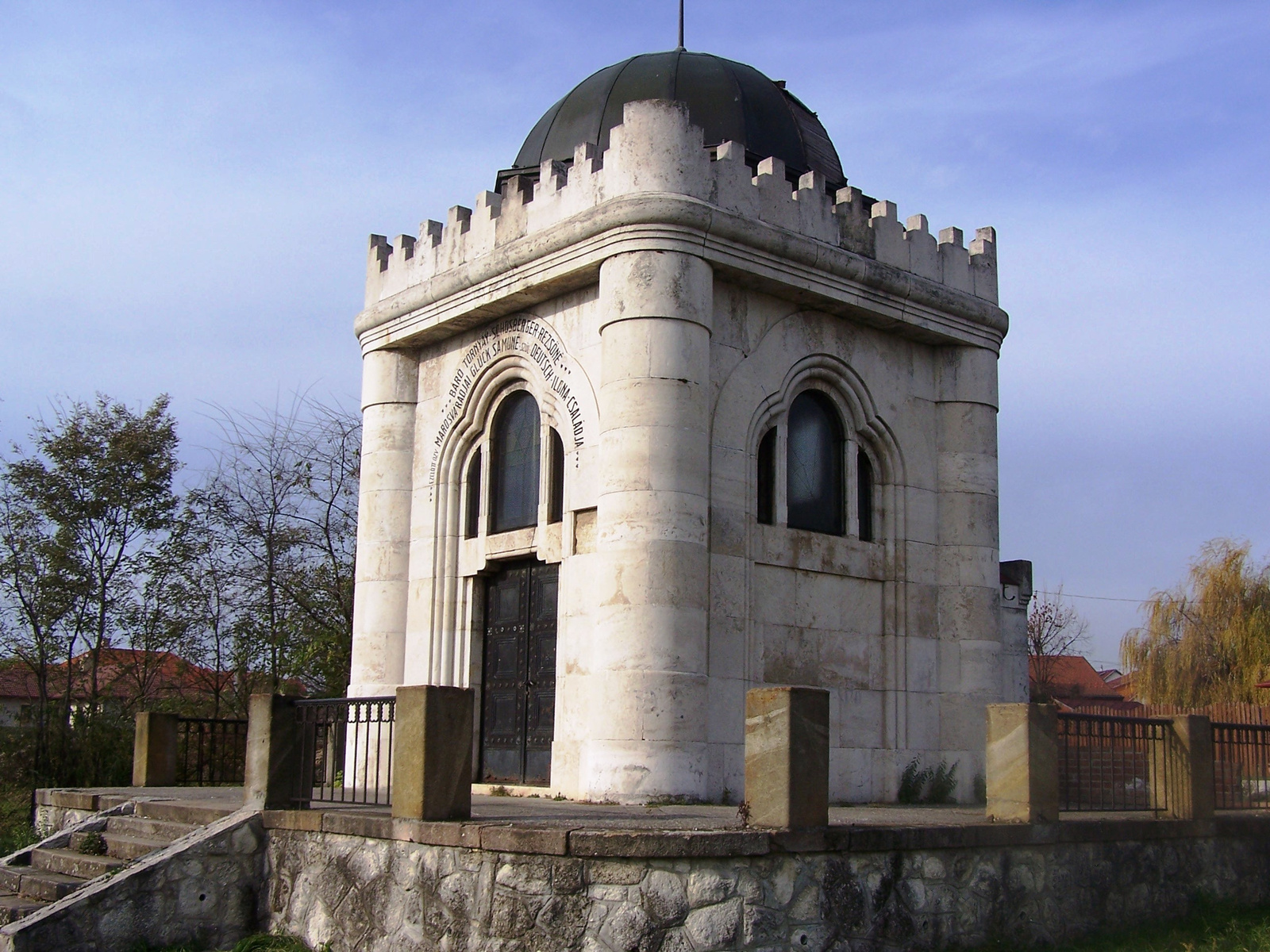 Schossberger-sírkápolna (Aszód, Zsidó temető) This is a photo of a monument in Hungary. Identifier: 6895